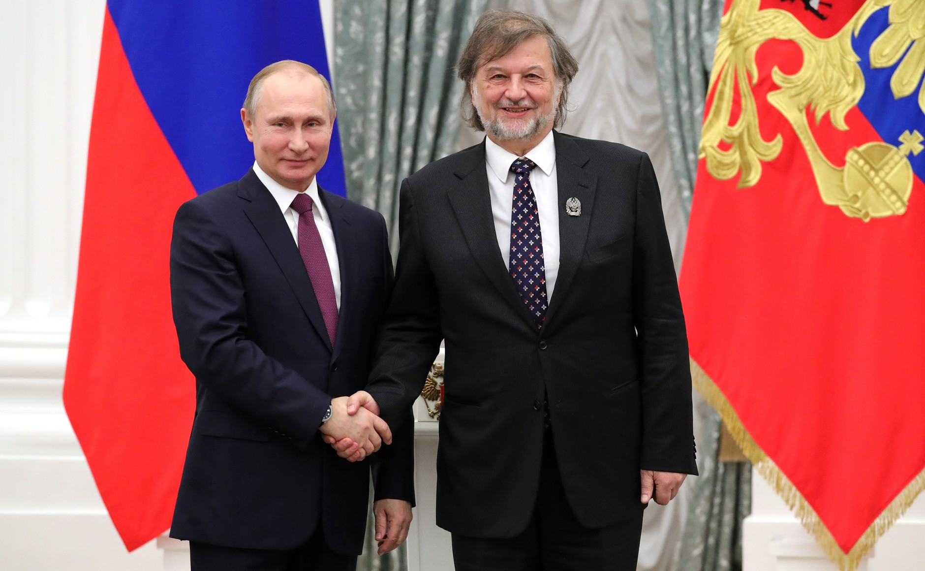 Премии Президента России в области литературы и искусства за произведения для детей и юношества удостоен композитор Алексей Рыбников.